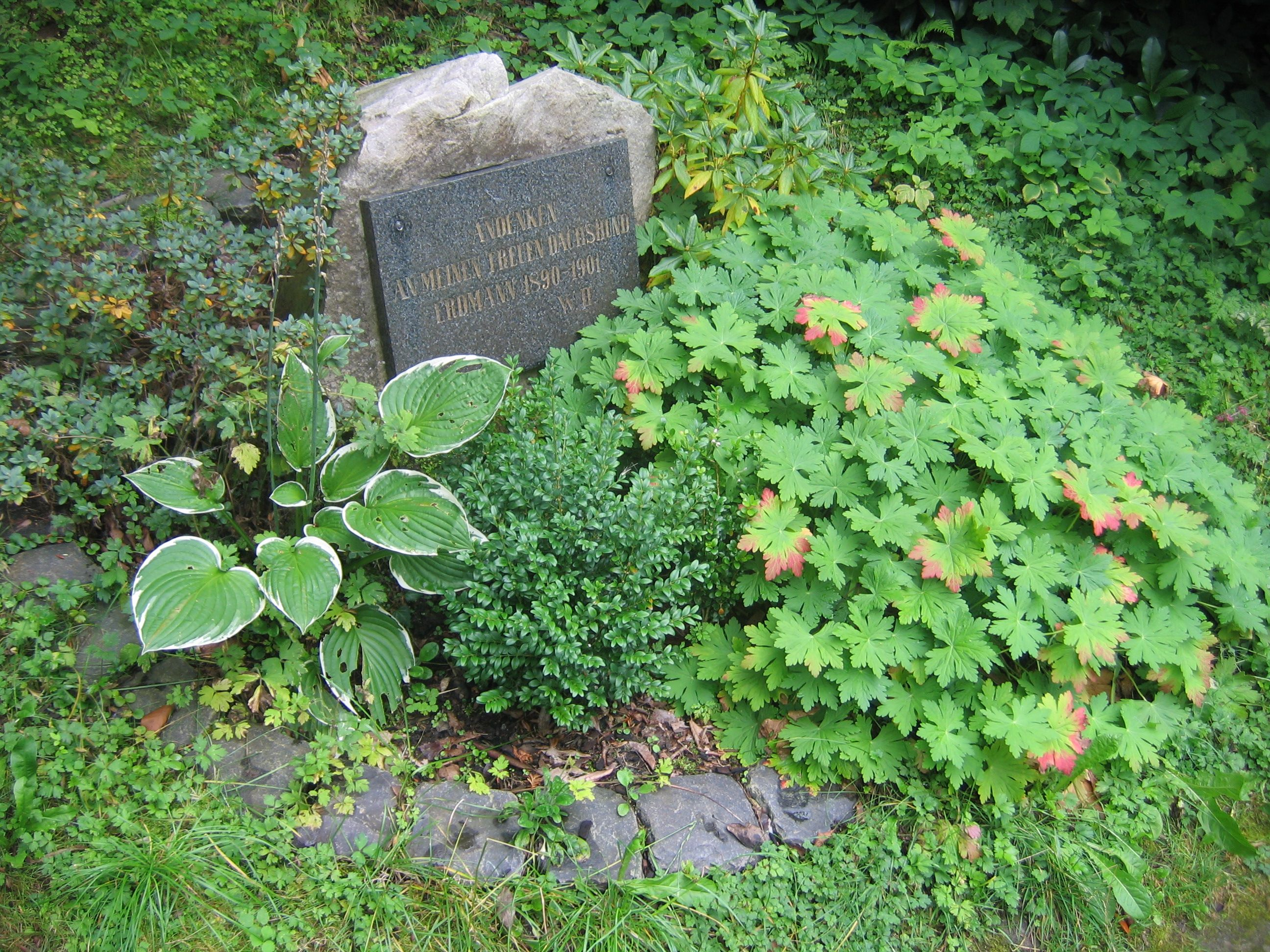 Grab des Kaiserdackels Erdmann, Park Schloss Wilhelmshöhe, Kassel / Tomb of Erdmann, dog of Emperor Wilhelm II, Park of Wilhelmshöhe Castle, Kassel, Germany